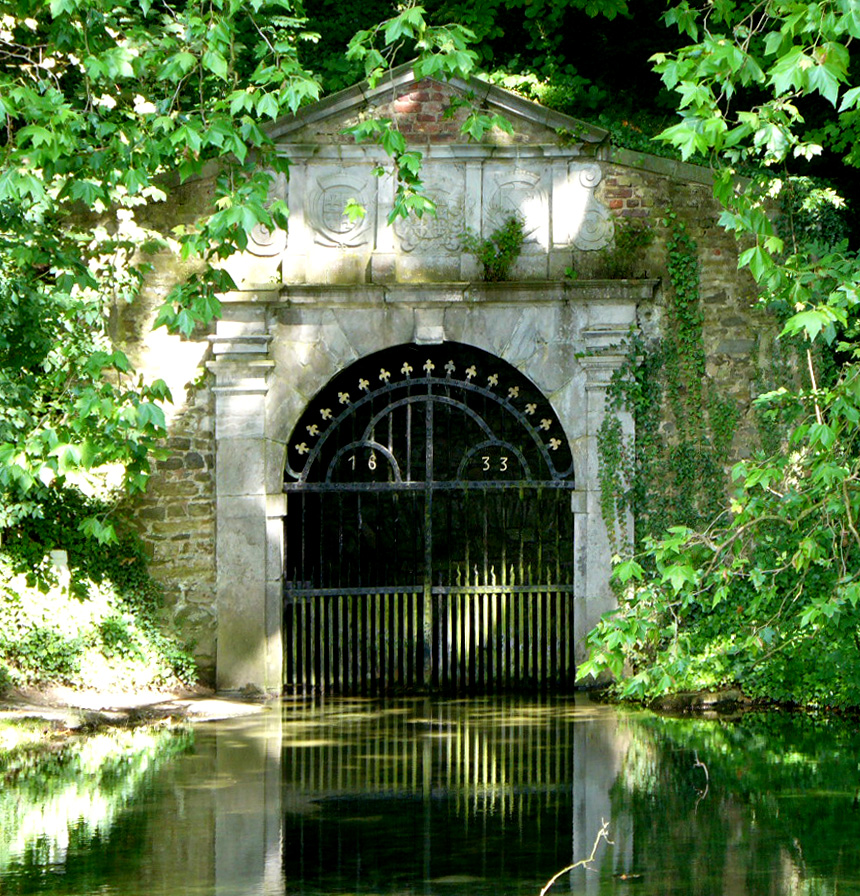 Brongebouwtje waaruit de Voer stroomt bij de commanderij van Sint-Pieters-Voeren